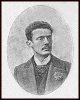 Valentim Magalhães (1859-1903), (en) Brazilian writer; (eo) brazila verkisto; (es) escritor brasileño; (pt) escritor brasileiro.